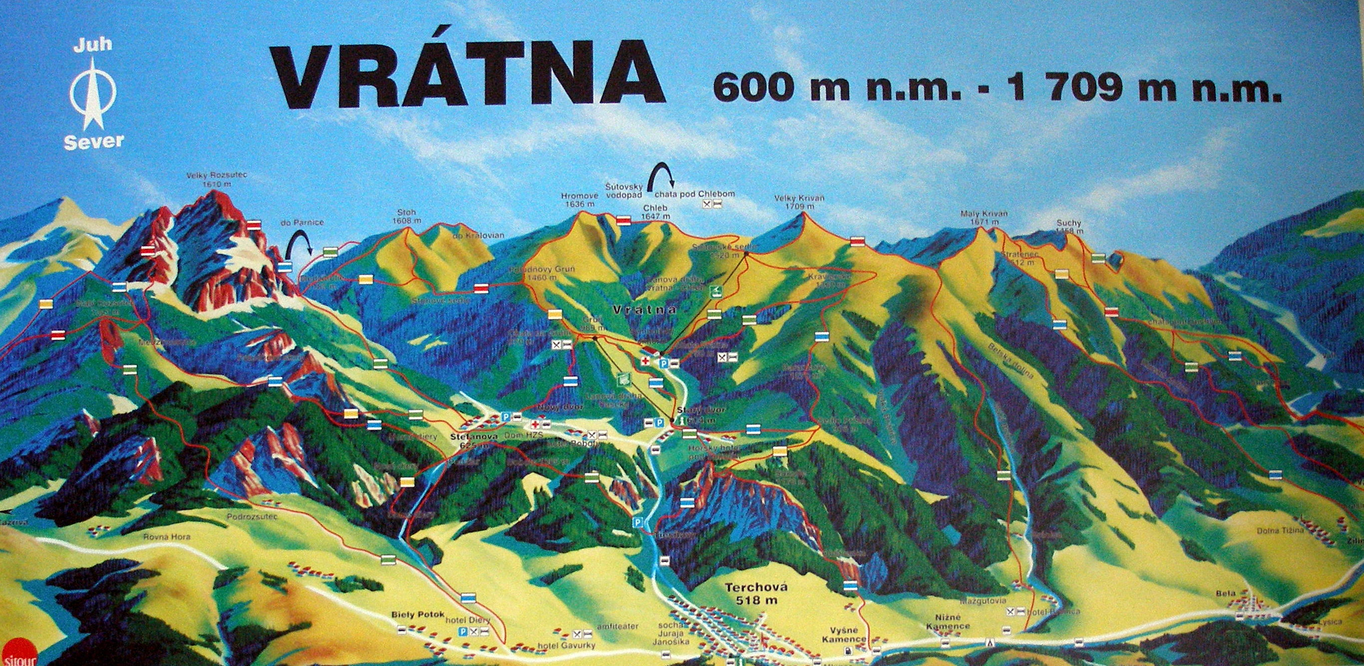 Vrátna dolina v pohorí Malej Fatry, verejná orientačná tabuľa